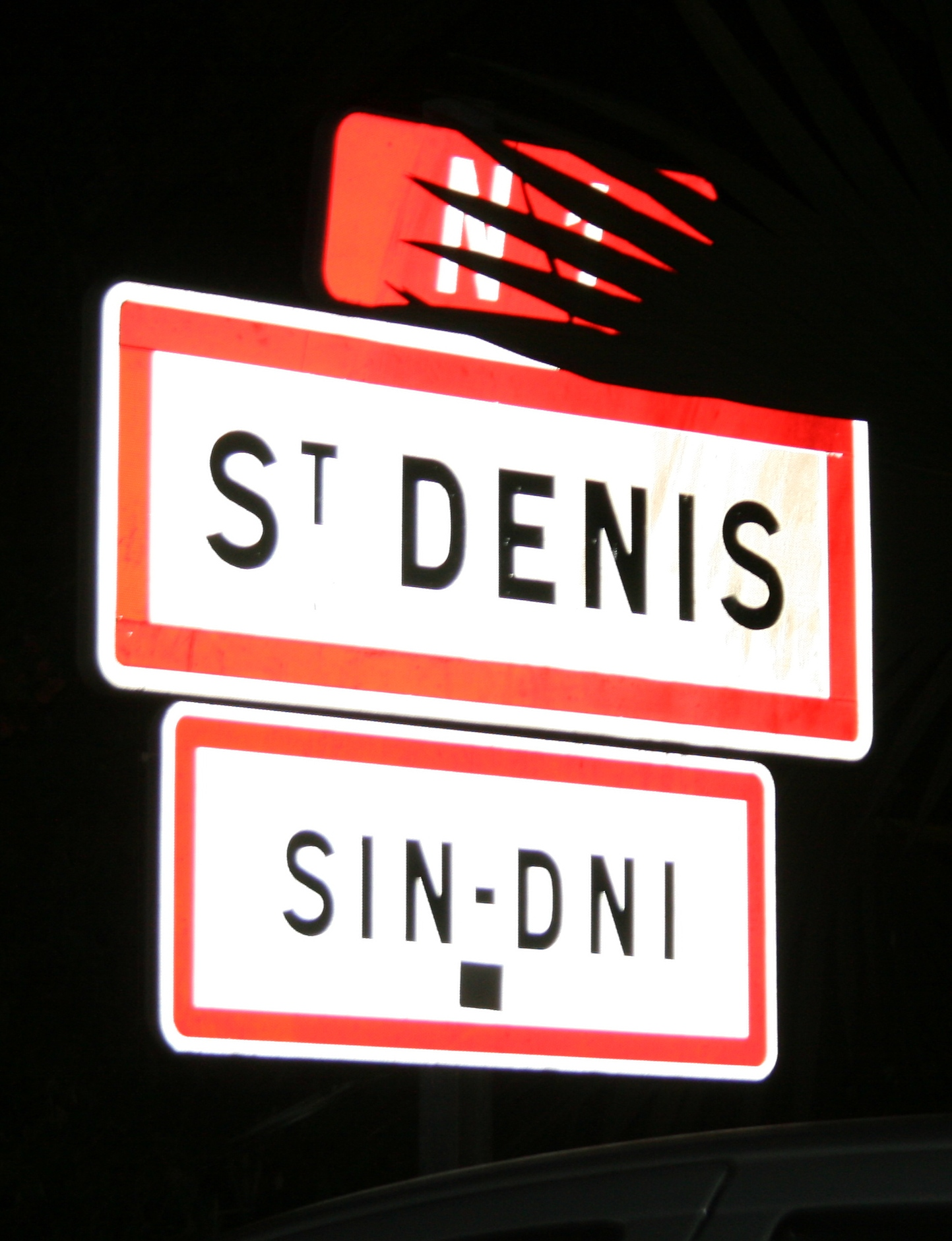 Panneau routier de la route nationale 1 indiquant Saint-Denis de La Réunion en français et créole réunionnais.